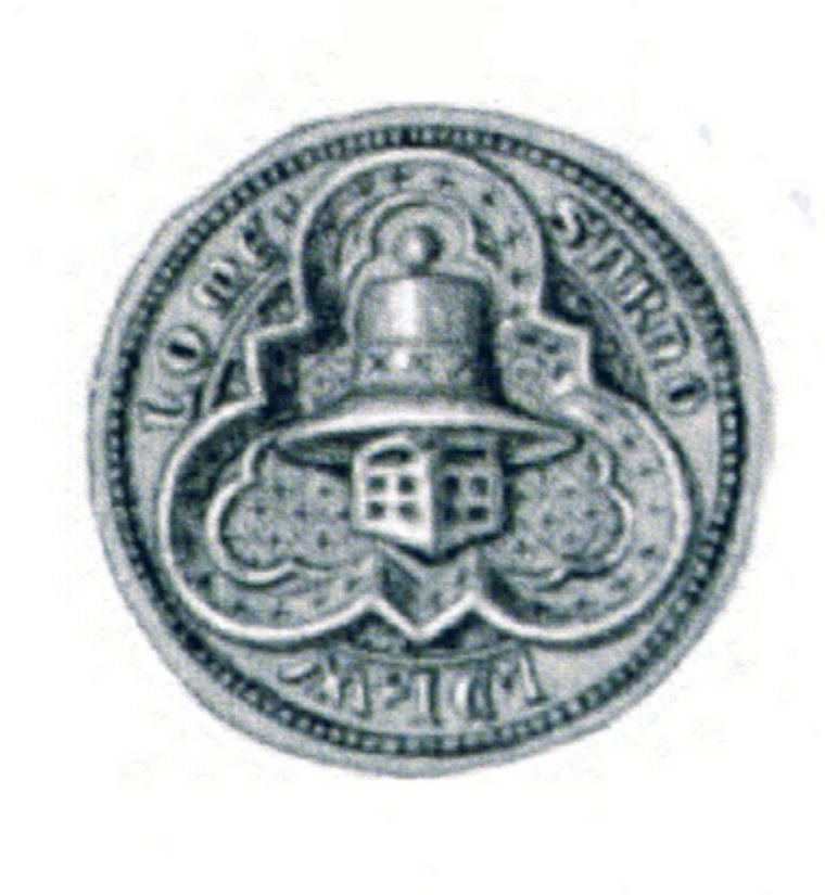 Siegel der Familie Wolme und des Ratmannes Arnoldus Wolme († 21. August 1329). Das Siegel stammt aus der Zeit um 1328. Siehe Emil Ferdinand Fehling: Lübeckische Ratslinie, Nr. 313 (Arnold Wlome).